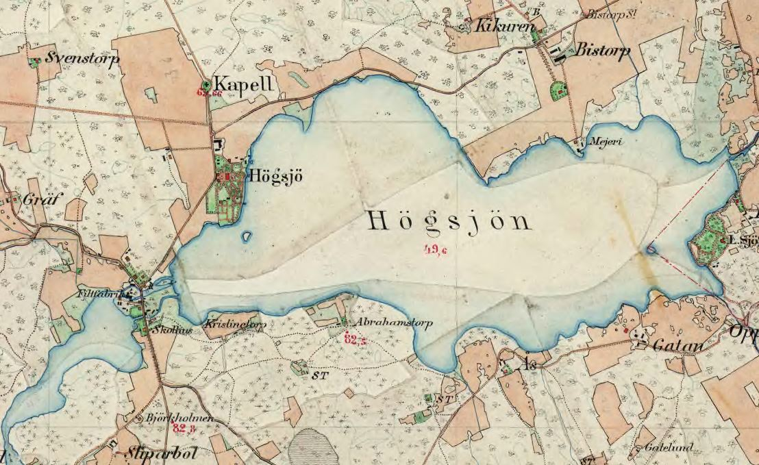 Högsjön och Högsjögård på Häradsekonomiska kartan